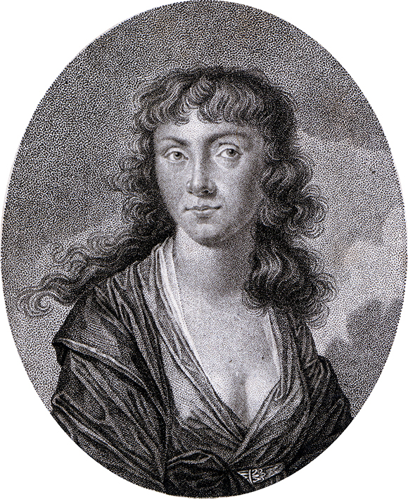 Die Dichterin Wilhelmine Müller, geb. Maisch (1767–1807) Kupferstich von Franz Xafer Gebhardt, um 1798